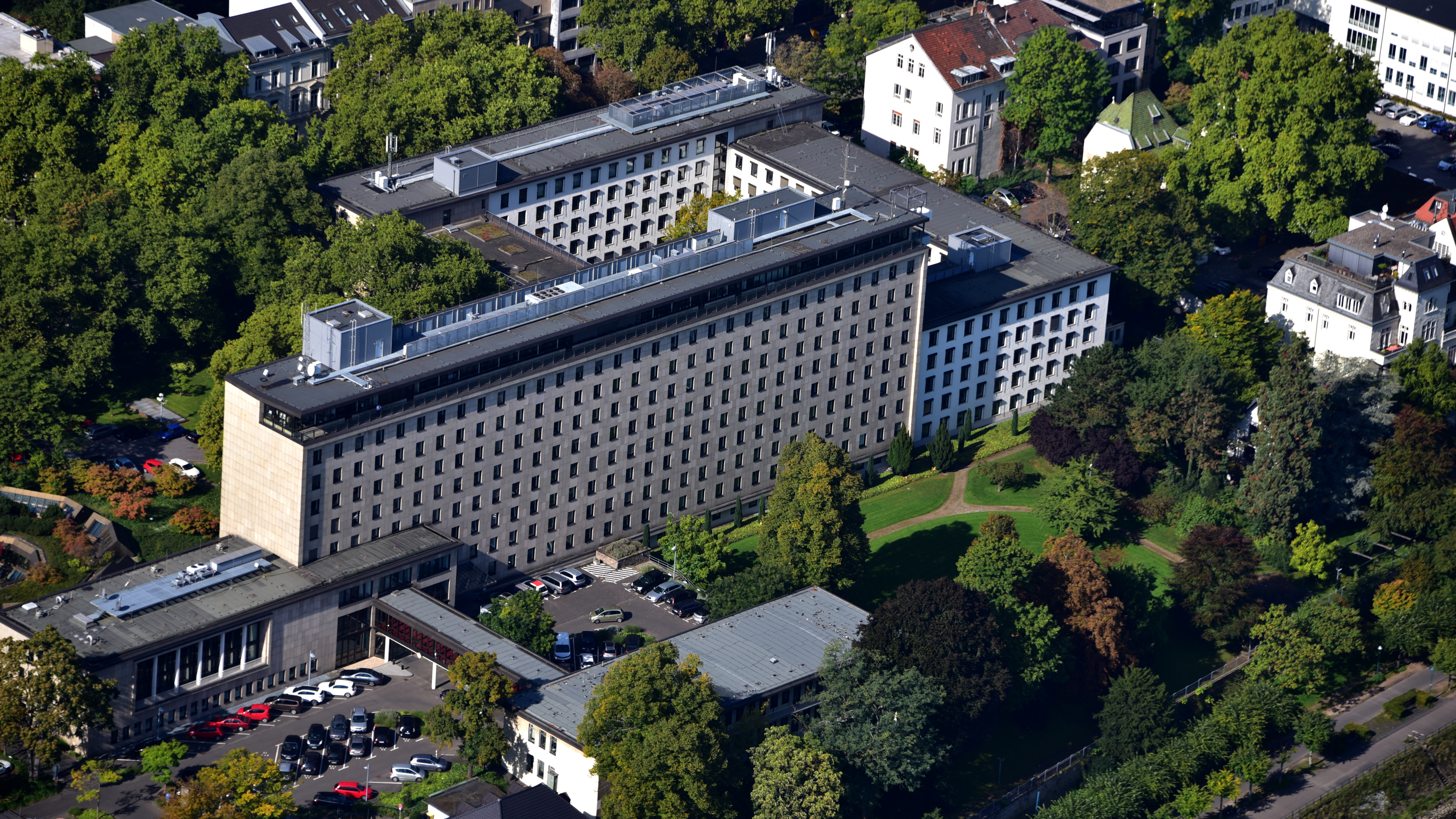 Bundesamt für Justiz (Gebäude des Auswärtigen Amts), Adenauerallee 99–103, Bonn-Gronau: Luftaufnahme (2017)